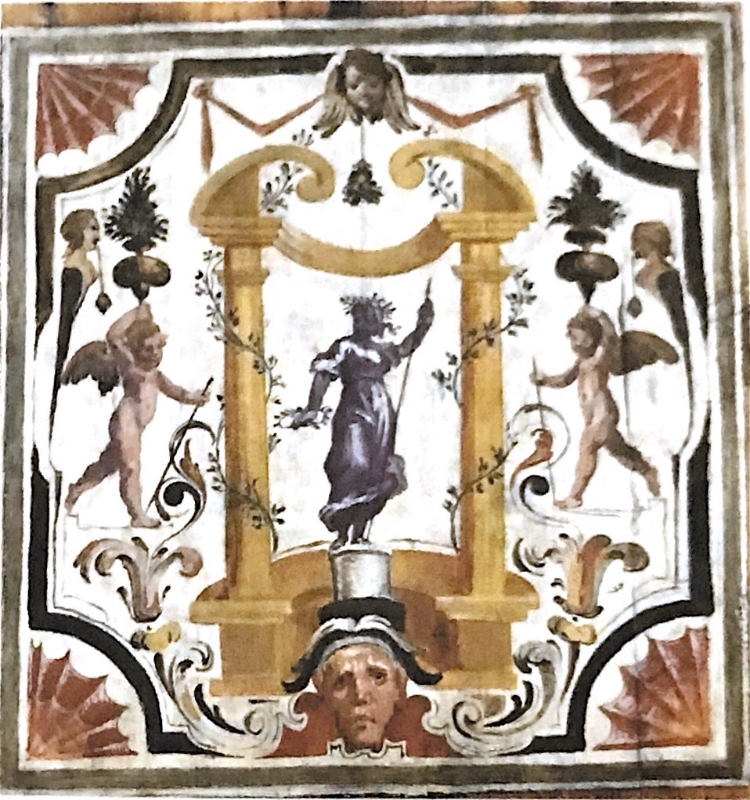 cassettone